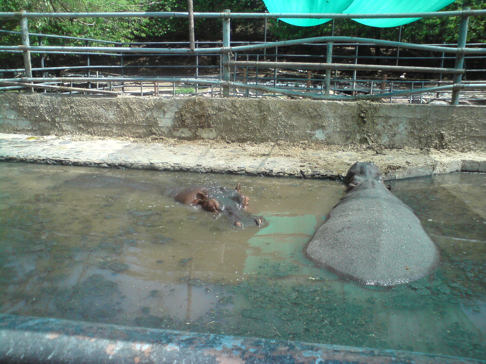 zoofari hipopotamo